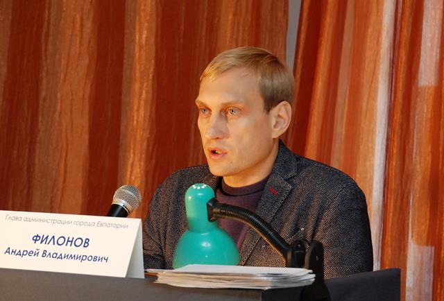 В субботу, 24 января, состоялась встреча главы администрации города Евпатории Андрея Филонова с новоозерновцами. Мероприятие прошло в рамках проекта «Открытый диалог с властью» и собрало полный актовый зал местной школы.